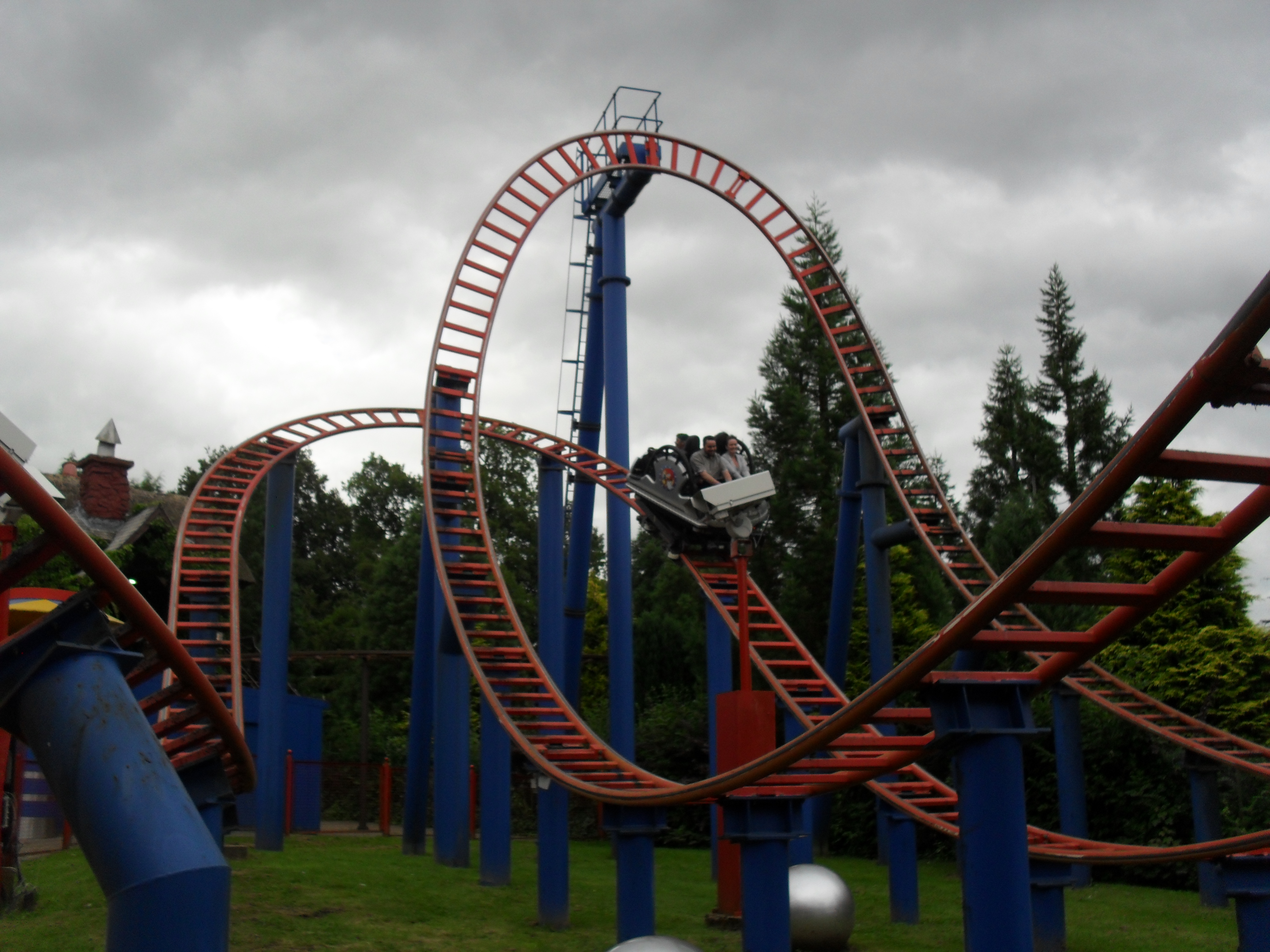 Fer à cheval des montagnes russes Sonic Spinball, à Alton Towers